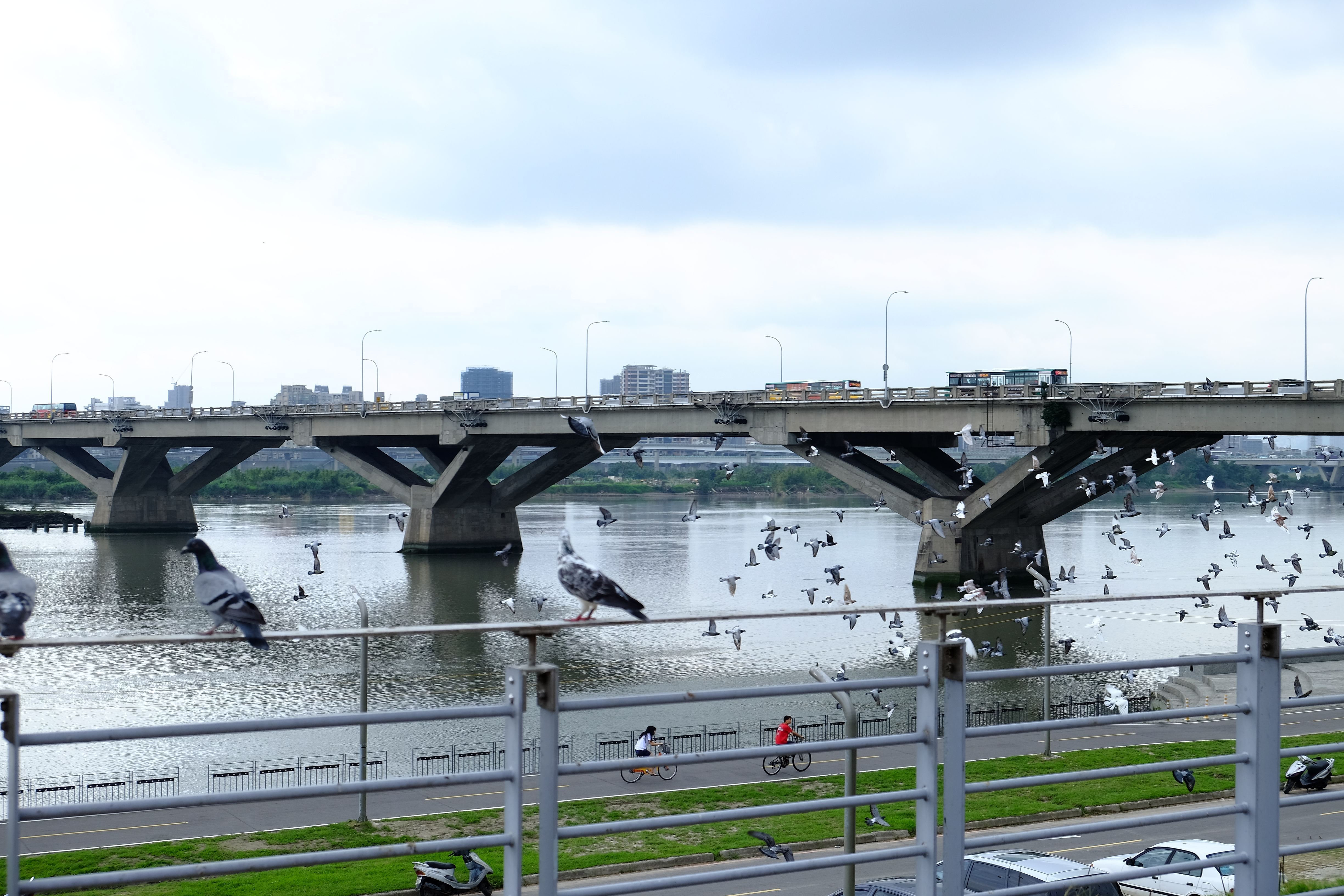 忠孝橋 三重端 鴿子多